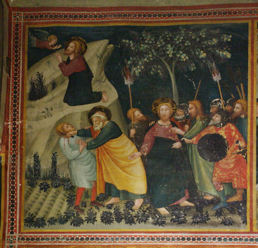 L'oració a l'hort i la detenció de Jesús, mentre sant Pere talla l'orella de Malcus